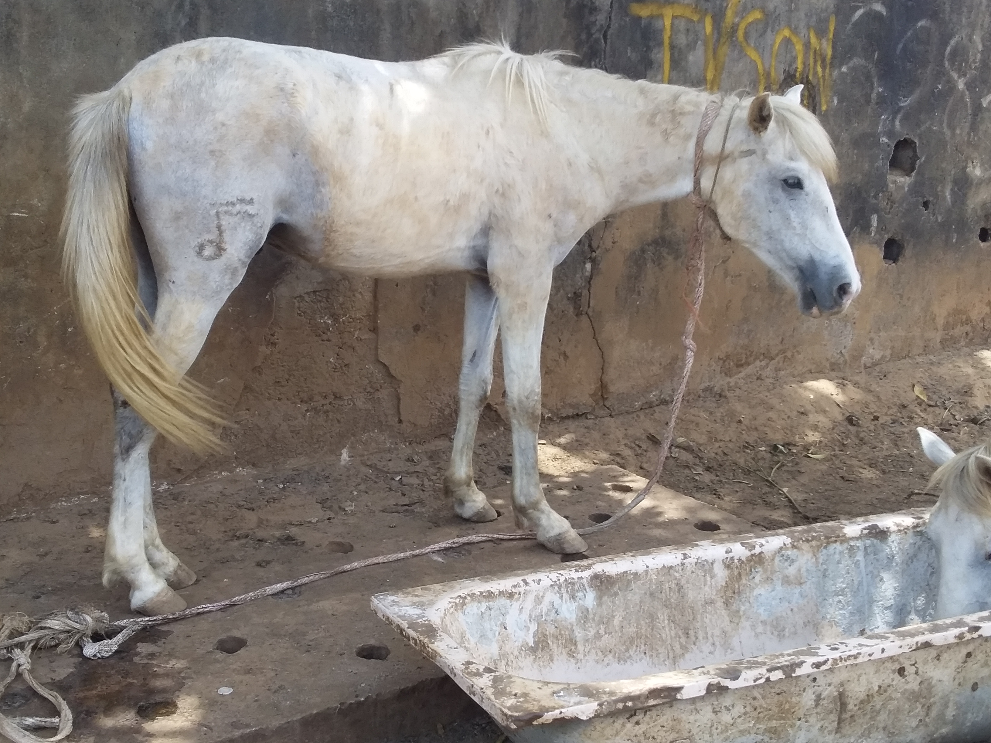 Cheval This is an image with the theme "Africa on the Move or Transport" from: Guinea